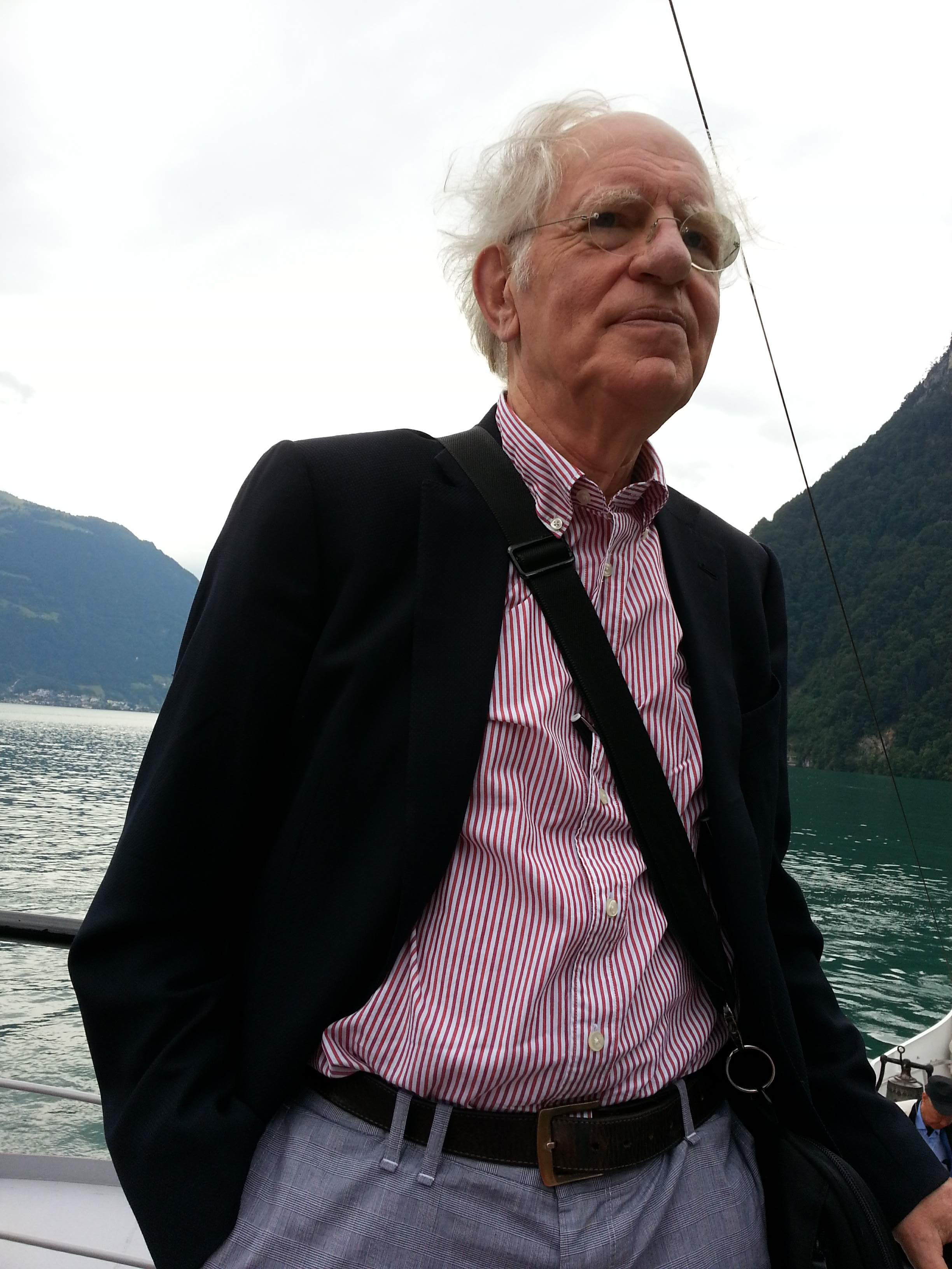 Willem Levelt